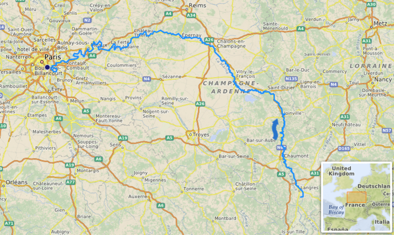 Carte réalisée sur umap, [1] This map may be incomplete, and may contain errors. Don't rely solely on it for navigation.